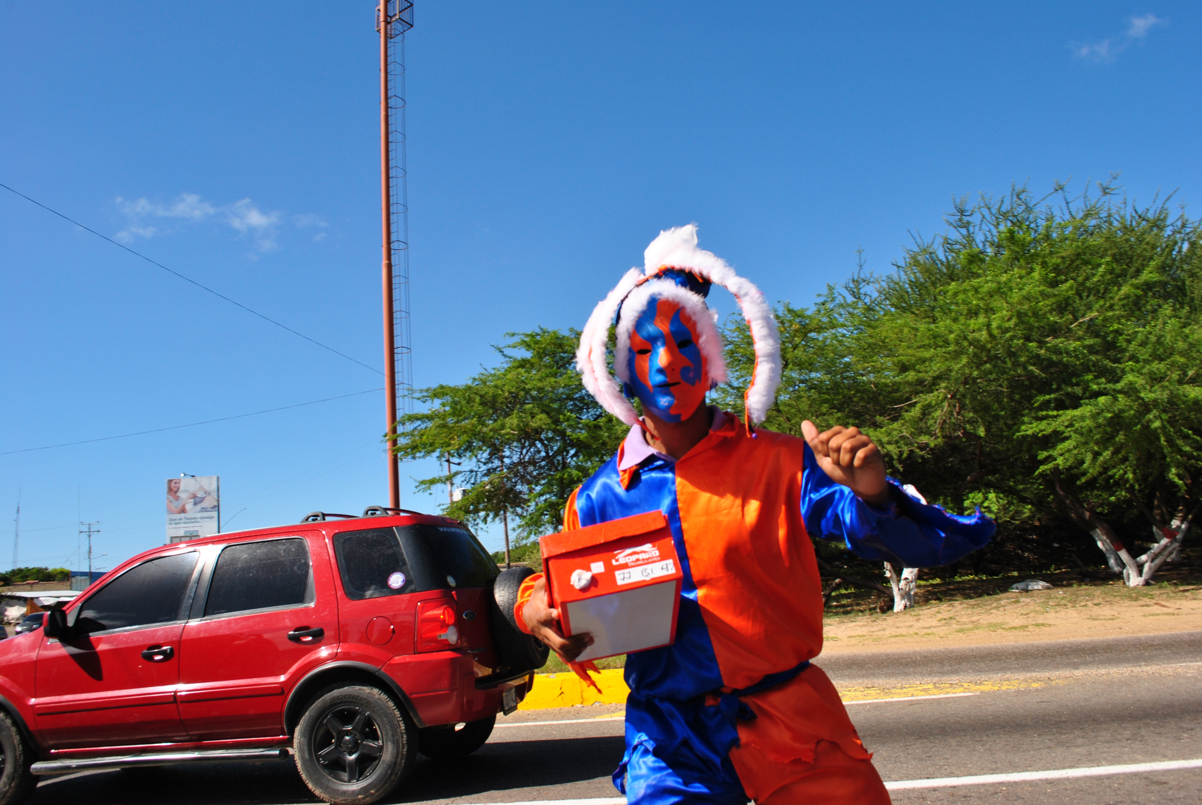 Locos de la Vela. La fiesta de Los Locos se celebra de distintas maneras en diferentes regiones del país. En el occidente, en el estado Falcón, específicamente en la Vela de Coro es en donde son mas populares. Se celebra todos los 28 de diciembre en el marco del día de los Santos Inocentes.